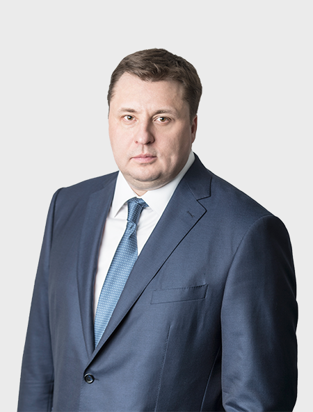 Косов Павел